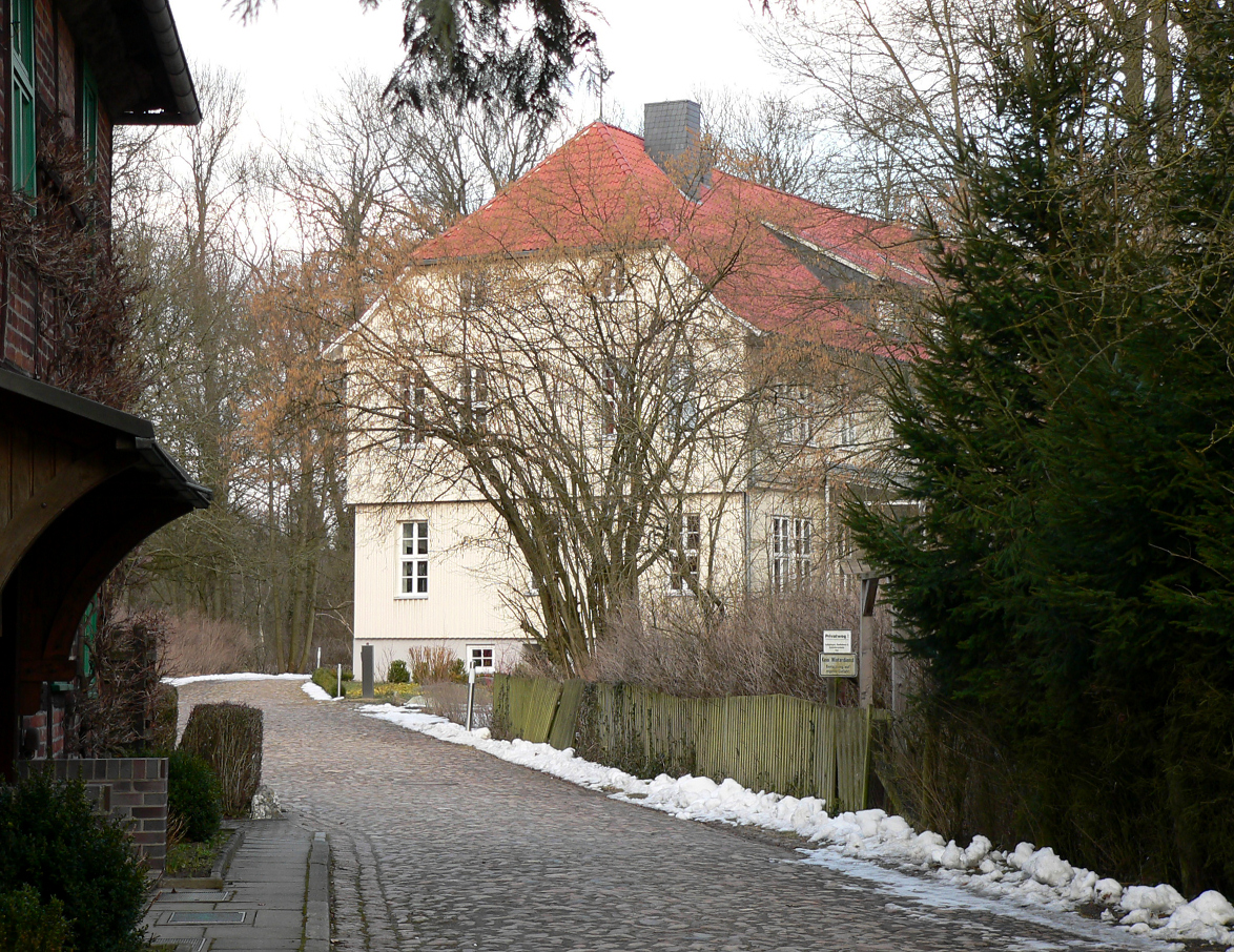 Amtshaus von Burg Knesebeck, von der Straße gesehen